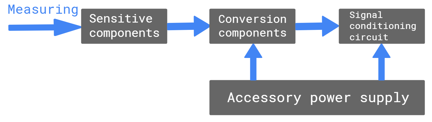 感測器元件，使用Autodraw